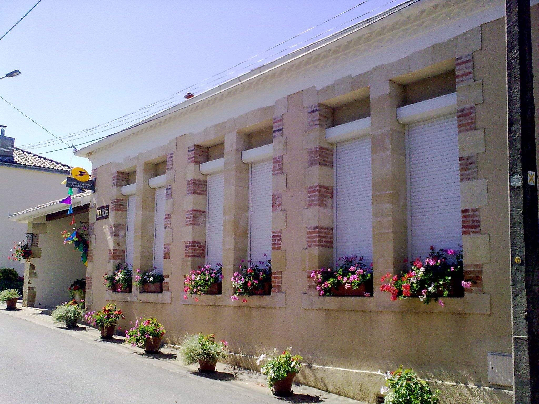 Cazalis (Landes) le 18 juillet 2010, France.